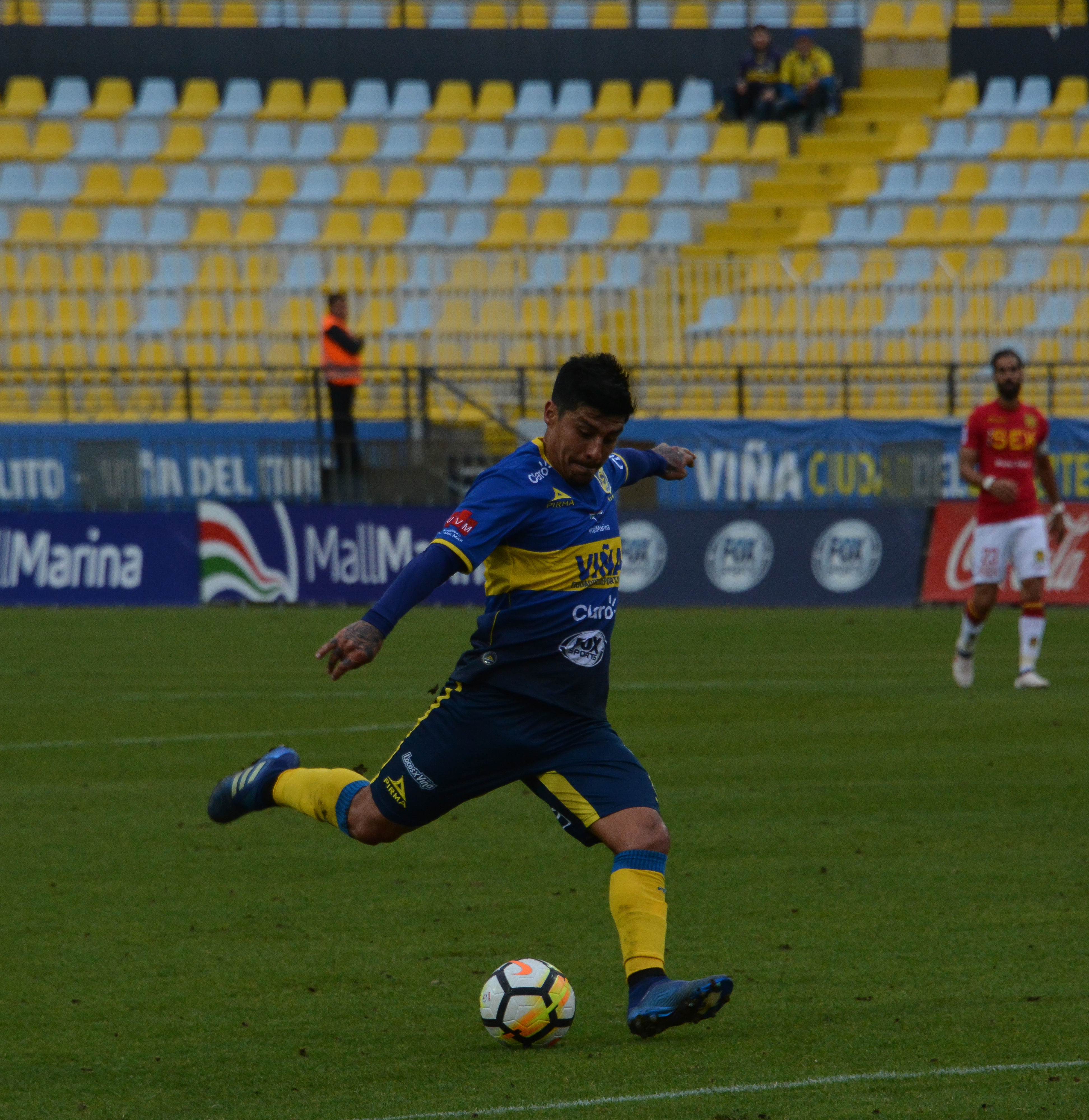 Everton v Unión Española, Estadio Sausalito, Viña del Mar, Chile.